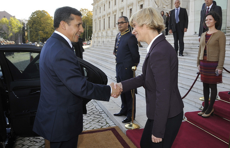 Presidente do Peru Ollanta Humala cumprimenta Assunção Esteves, Presidente da Assembleia da República portuguesa